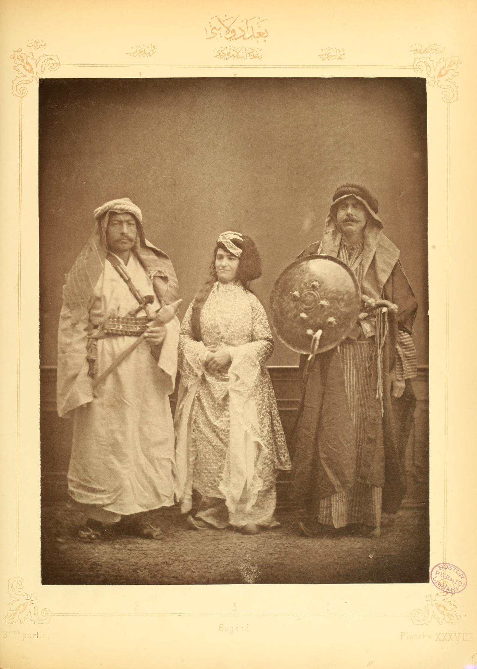 VILAYET DE BAGHDAD PLANCHE XXXVIII: Arabe Chammar Arabe Zobeïd Dame musulmane de Baghdad